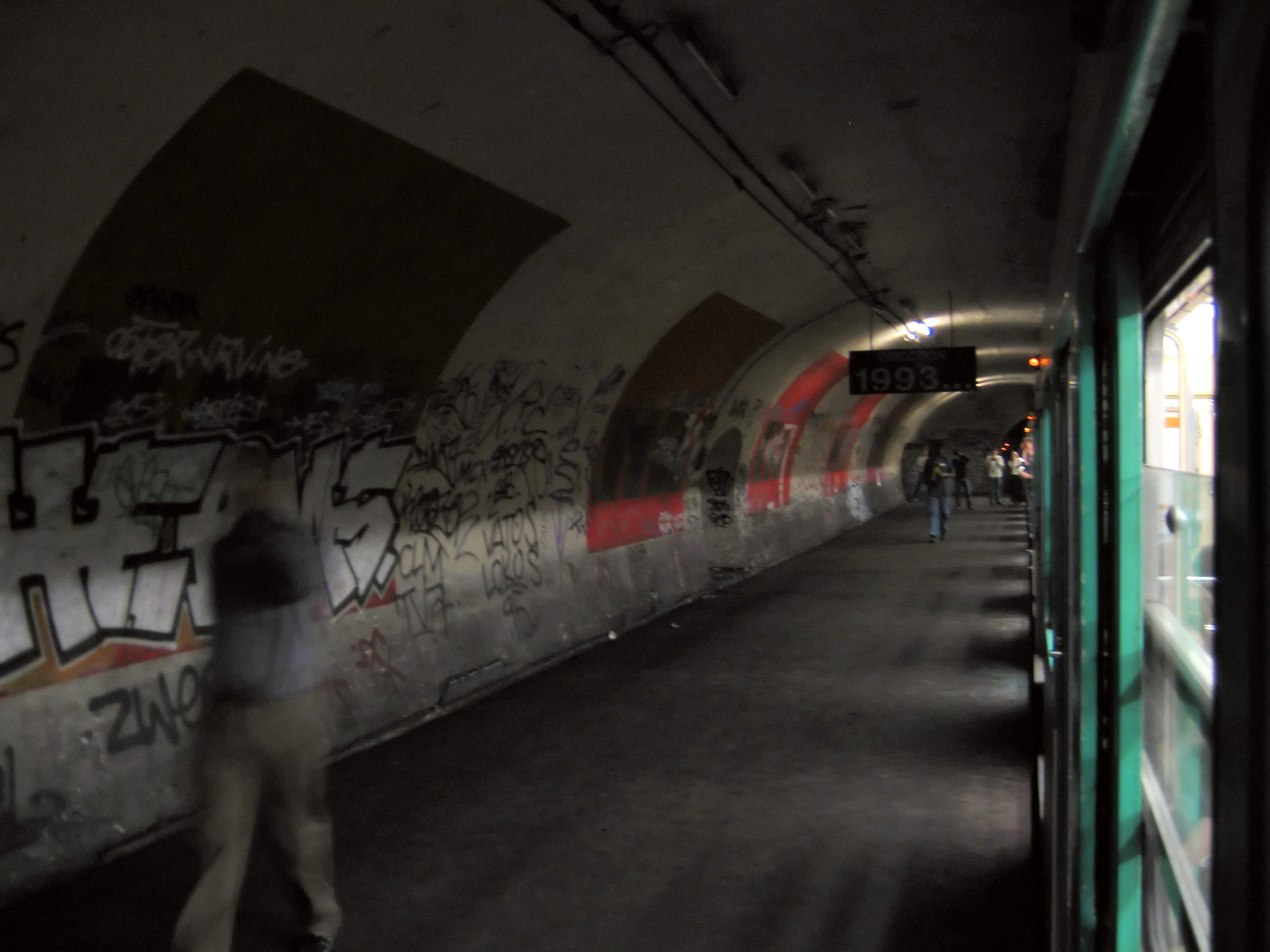 Haxo, station fantôme. Journées du patrimoine RATP 16-17/09/2006.